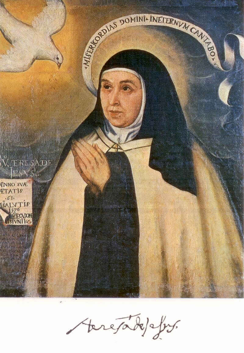 Fray Juan de la Miseria pintó el rostro de Santa Teresa sobre lienzo, que es el cuadro más parecido al aspecto original, por realizarlo con la protagonista delante de sus ojos, y con los pinceles en la mano.